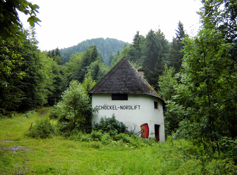 Talstation des alten Schöckl-Nordlifts im Semriach